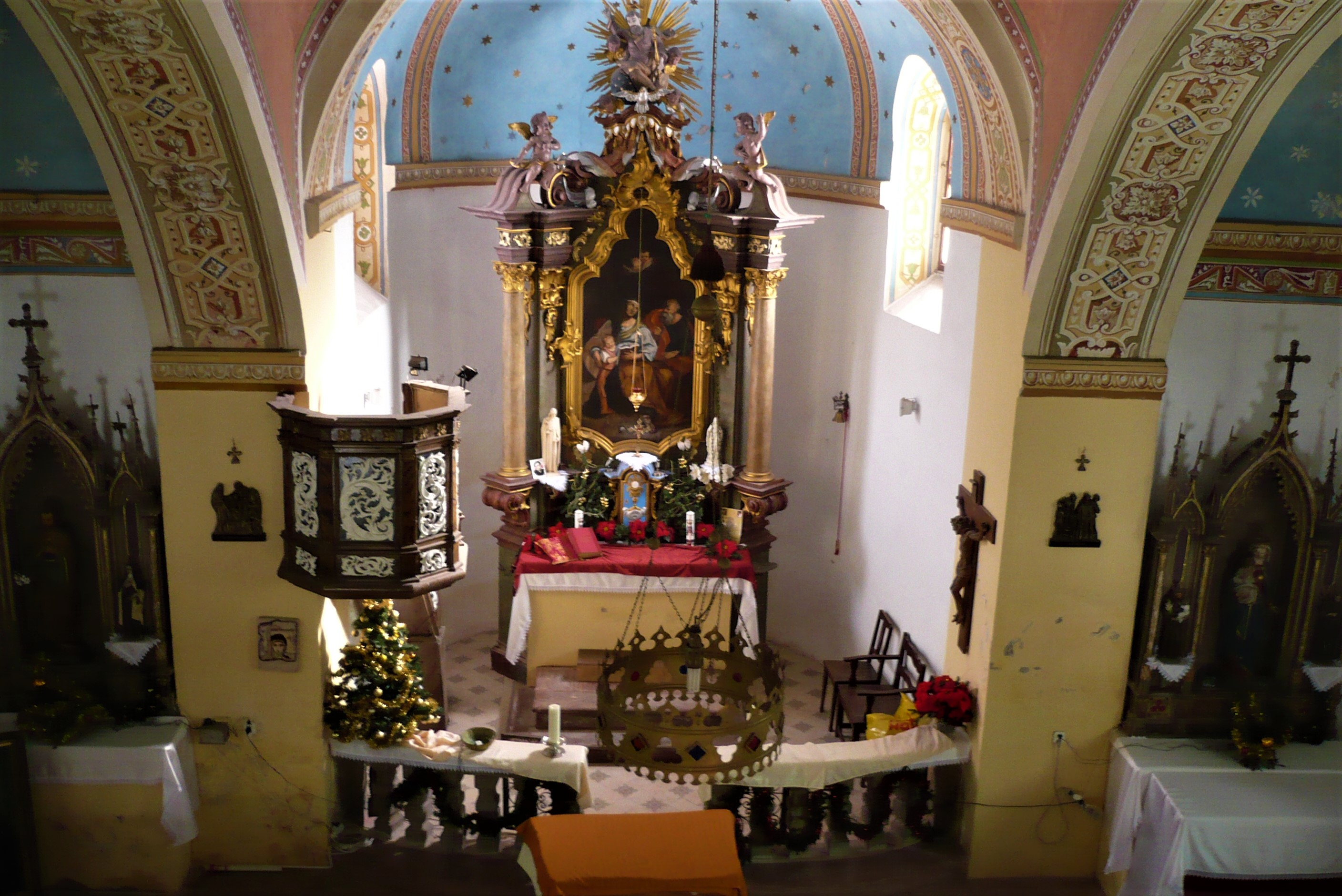 Widok z chóru